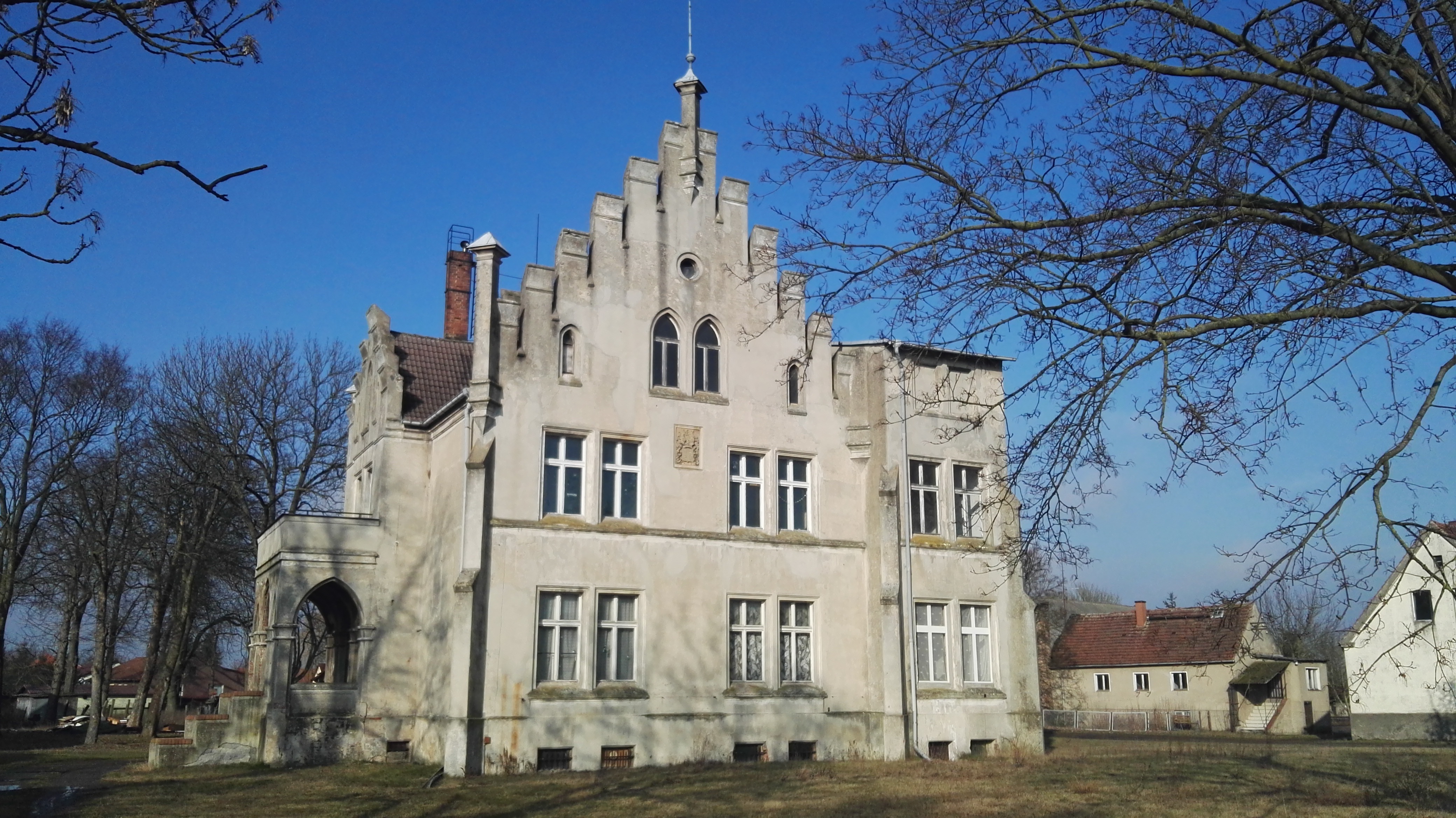 denkmalgeschütztes Rittergut Vietznitz (Herrenhaus)